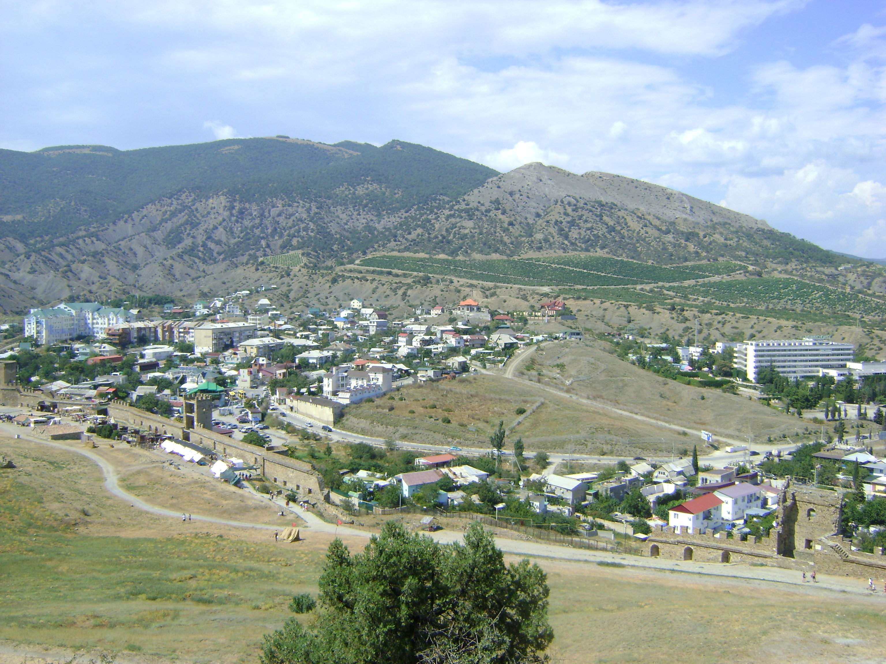 Літо 2016 р.